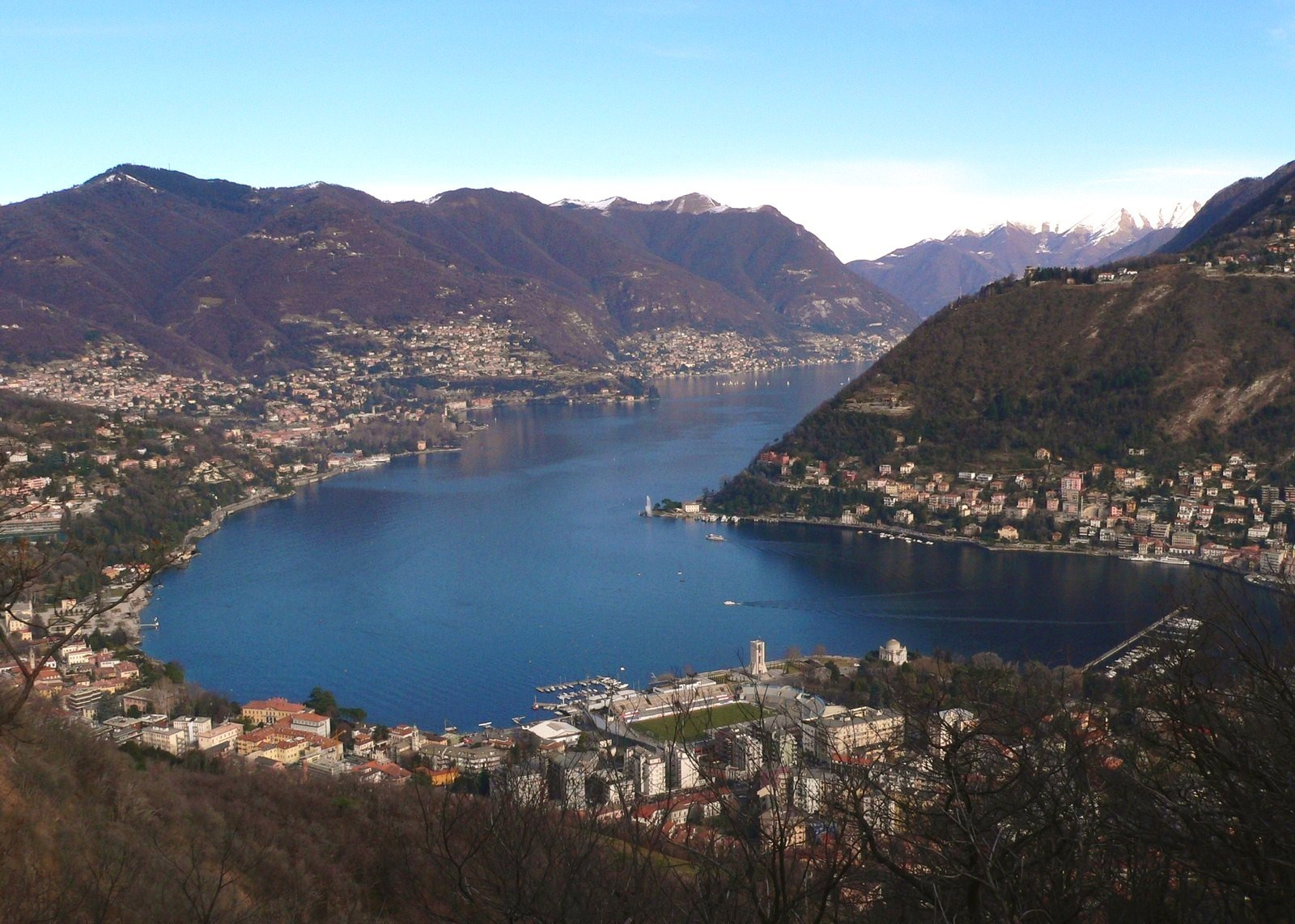 Вид на город и озеро Комо, Италия.